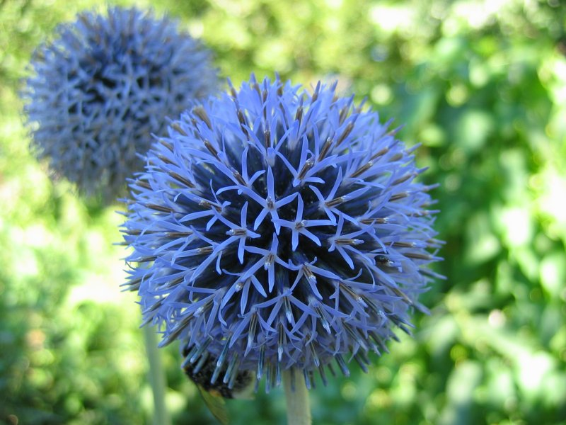 Ritro-Kugeldistel Echinops ritro, Rostock